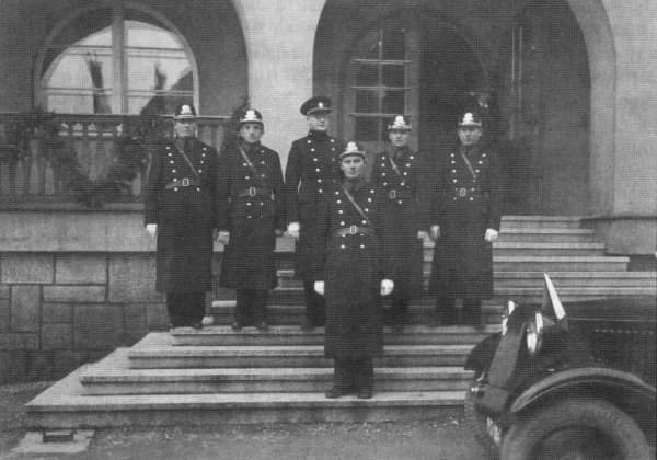 Četníci před Vsetínskou sokolovnou, 30. léta 20. století